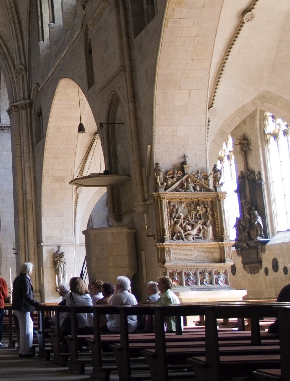 Ausschnitt aus dem Bild File:NRW, Munster - St.Paulus Dom 08.jpg zur Verdeutlichung der Raumsituation um die Kanzel